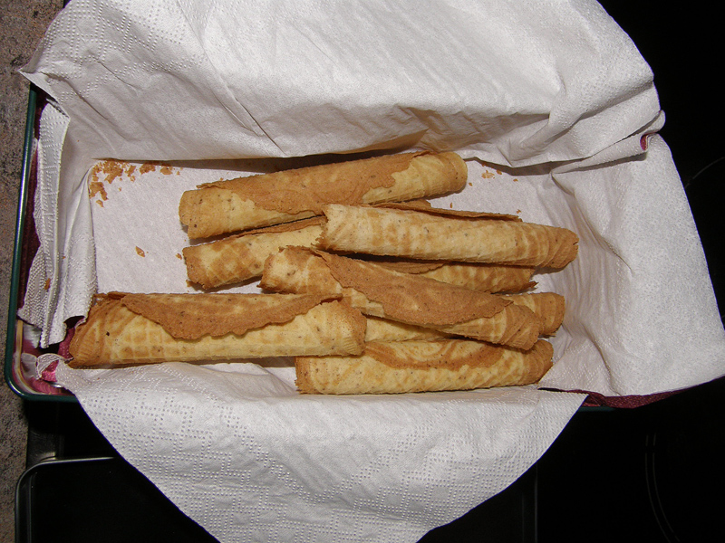 Essen